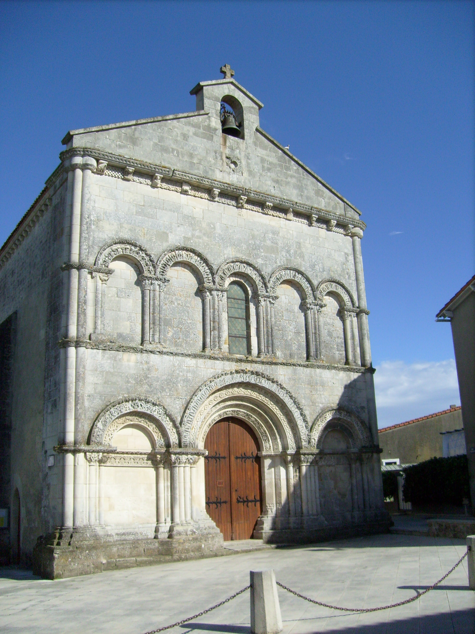 église de Médis, Charente-Maritime, France